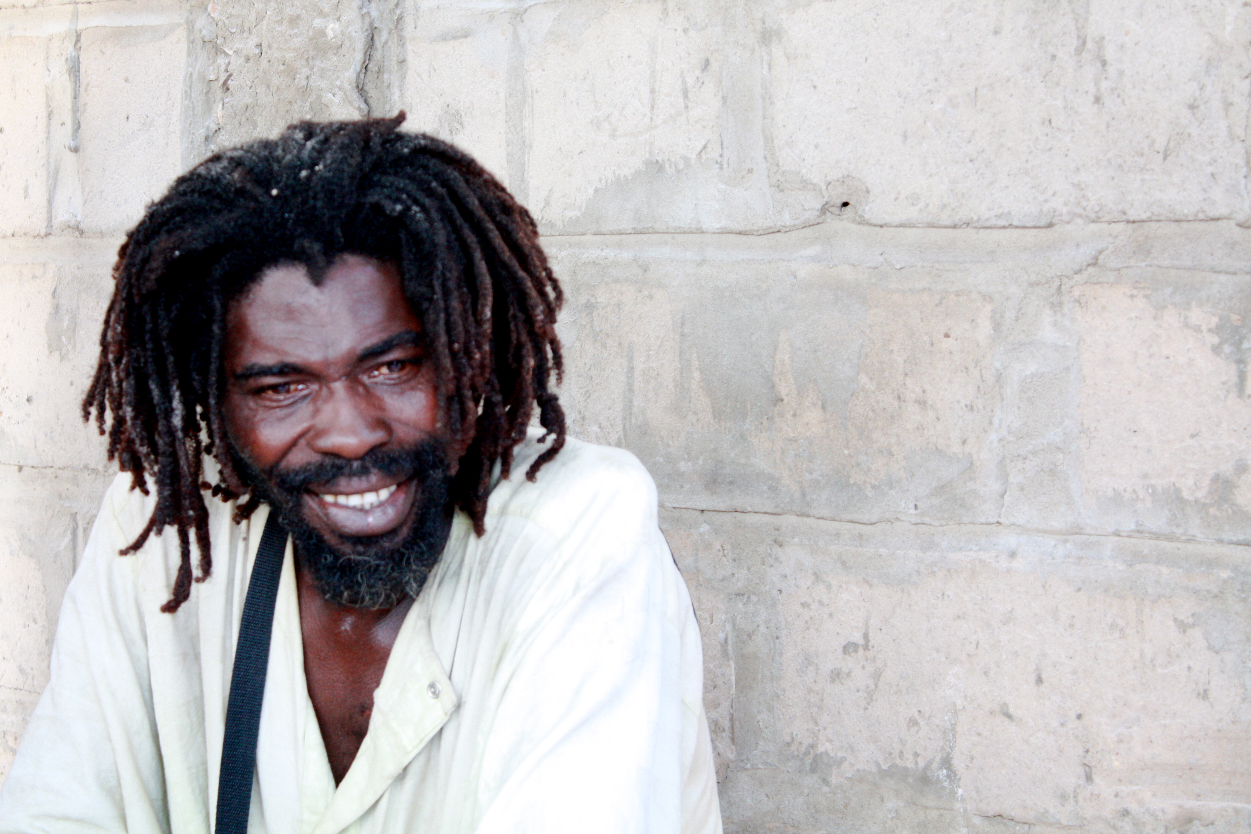 Baye Fall à Mboro (Sénégal)